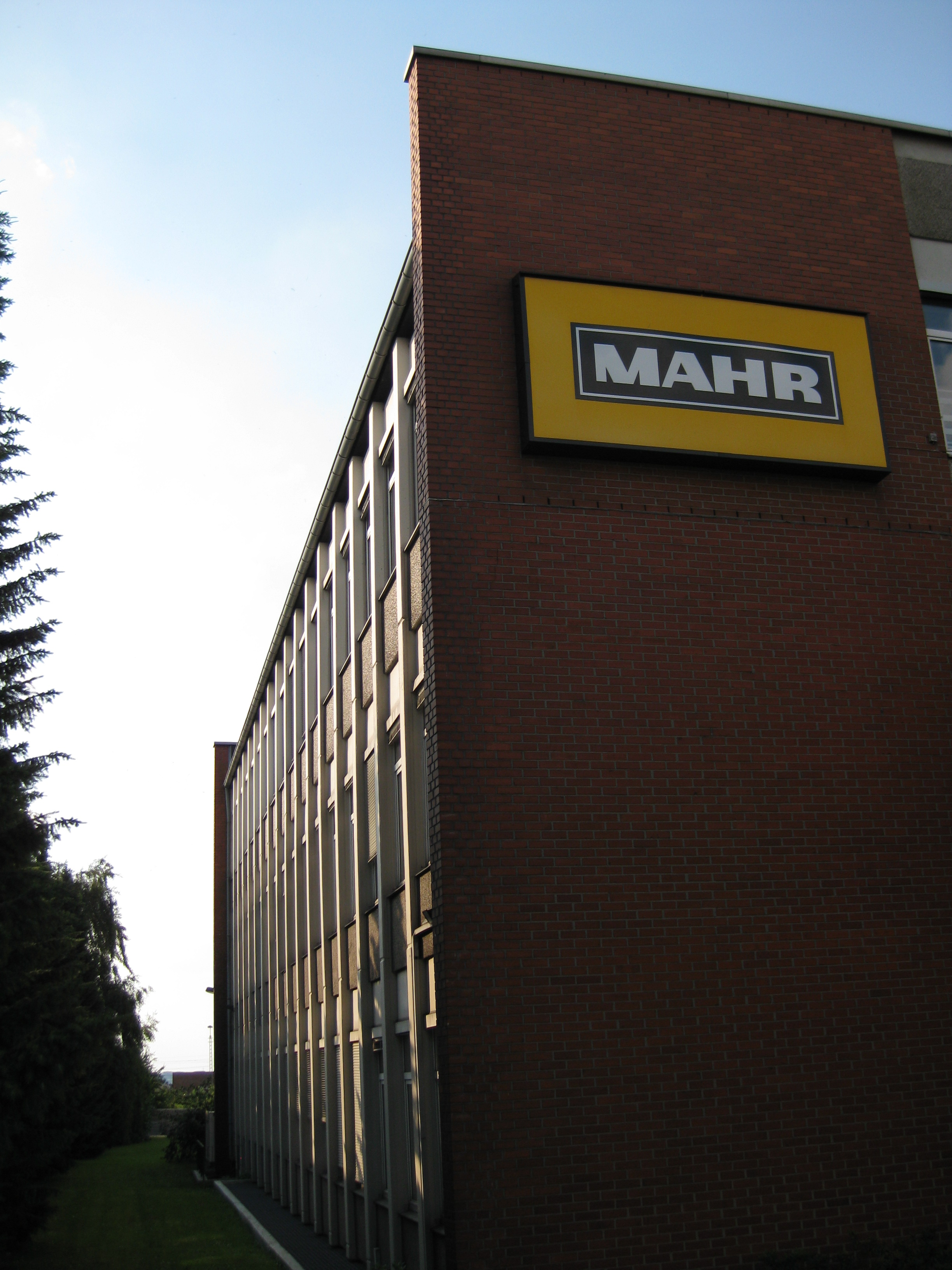 Bürogebäude